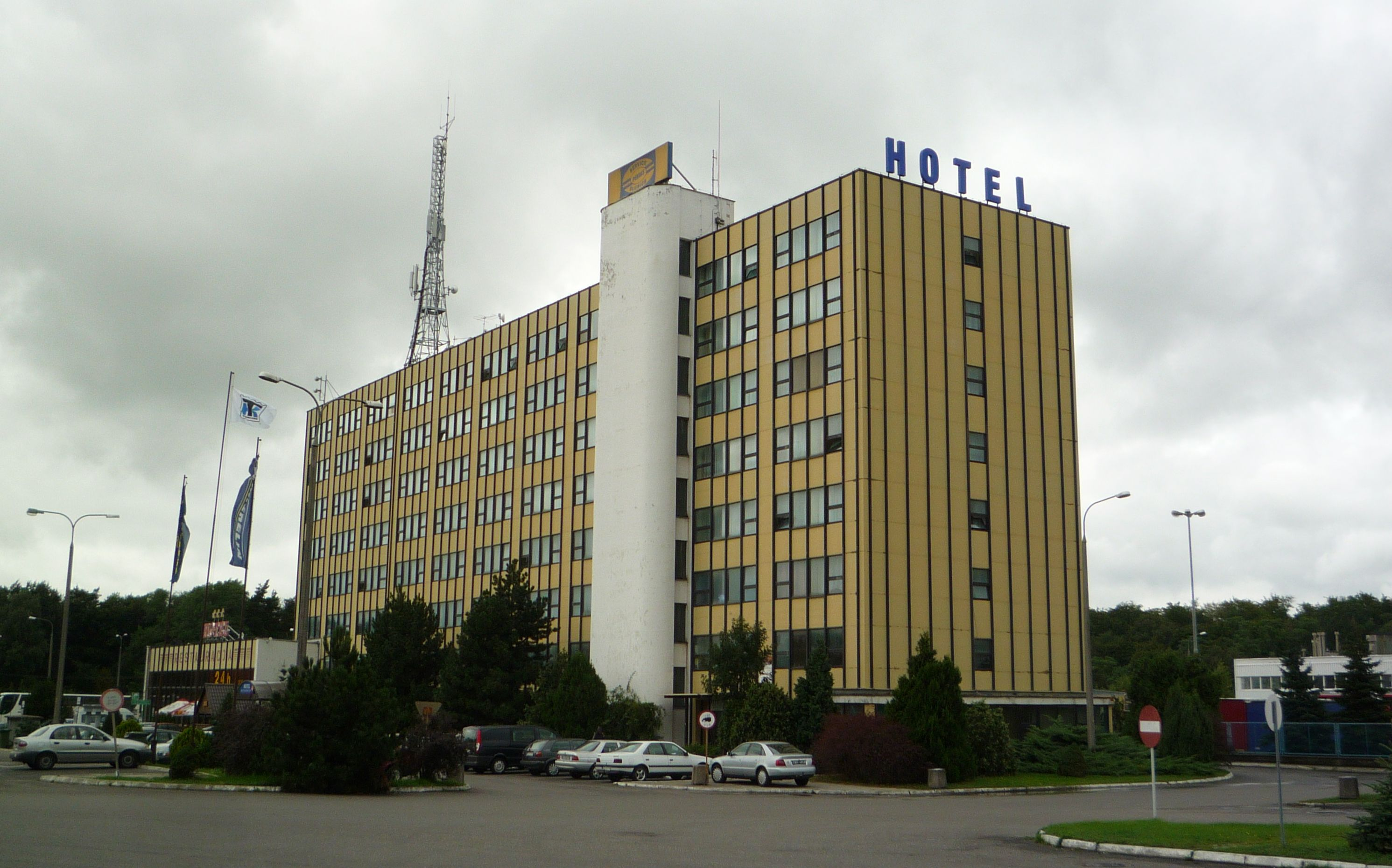 Hotel Cargo przy ul. Transportowej w Słubicach.